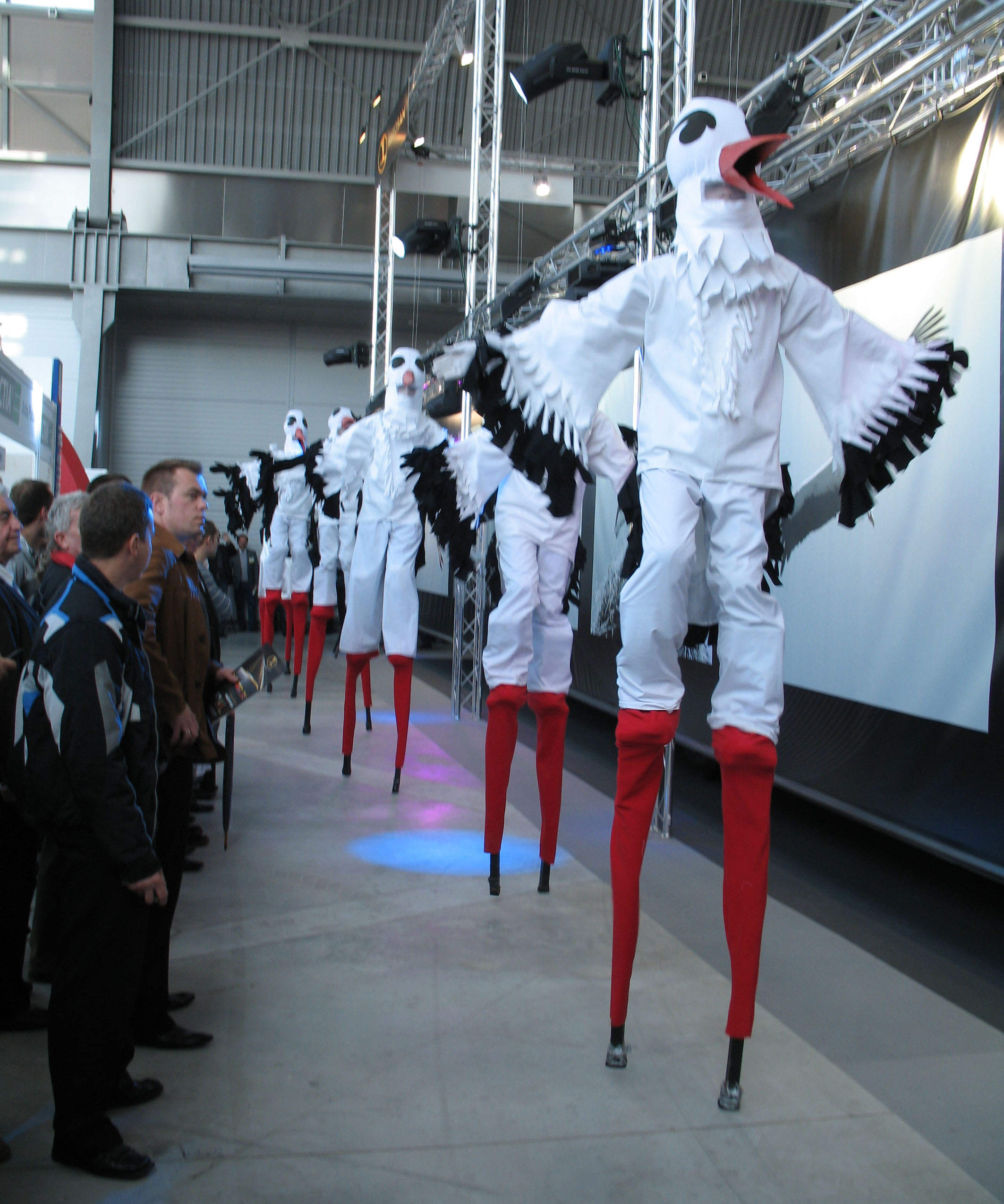 Pokaz baletowy podczas oficjalnego debiutu autobusu Autosan Sancity 18LF na stoisku firmy podczas targów Transexpo 2010. Zespół składał się z sześciu bocianów i bocianic (na szczudłach) oraz jednego bocianiątka (bez szczudeł).